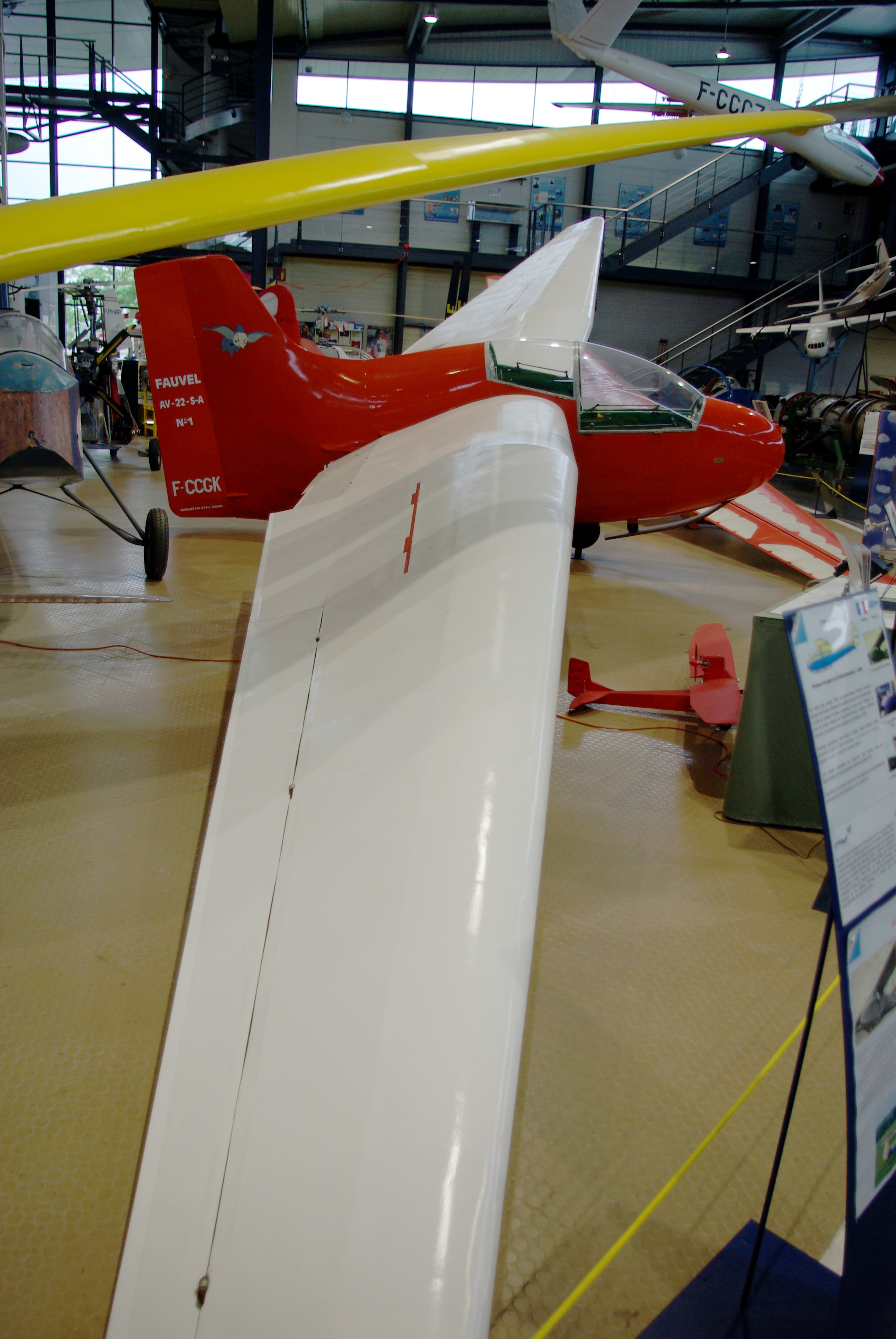 Fauvel AV-22 au musée régional de l'air d'Angers-Marcé.